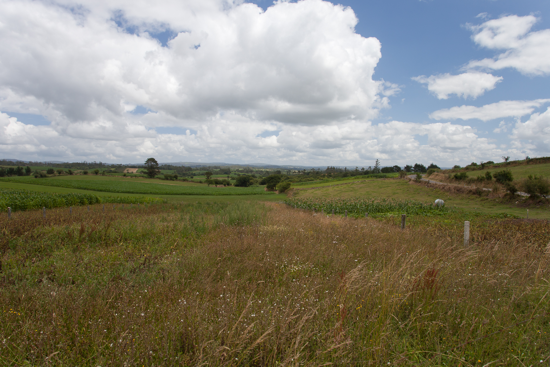 Castro de Foxo, Galiza. Queda próximo Á Pereira, o letreiro indicaba ese nome, pero non aparece no Nomenclator da Xunta de Galicia